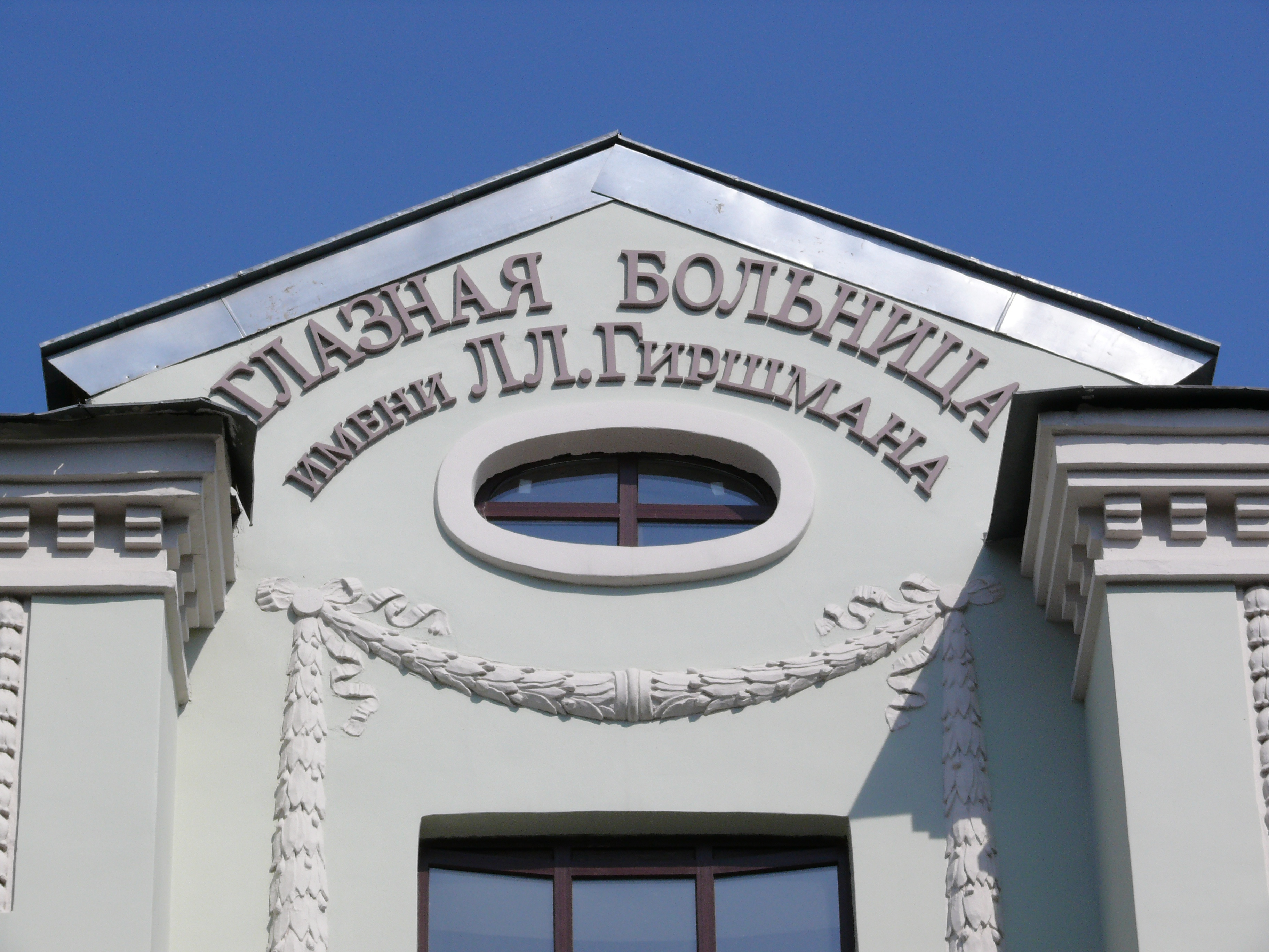 Girshman hospital in Kharkov. 1912 Трёхэтажная глазная больница профессора Леонарда Леопольдовича Гиршмана. Портик третьего этажа над главным входом. Харьков, ул. Мироносицкая, 90, Киевский район. Фасад выходит на ул. Олеся Гончара. Здание построено специально для глазной клиники Гиршмана в 1912 году архитектором Л.К. Тервеном. Реставрировано в 2007. Стиль модерн.